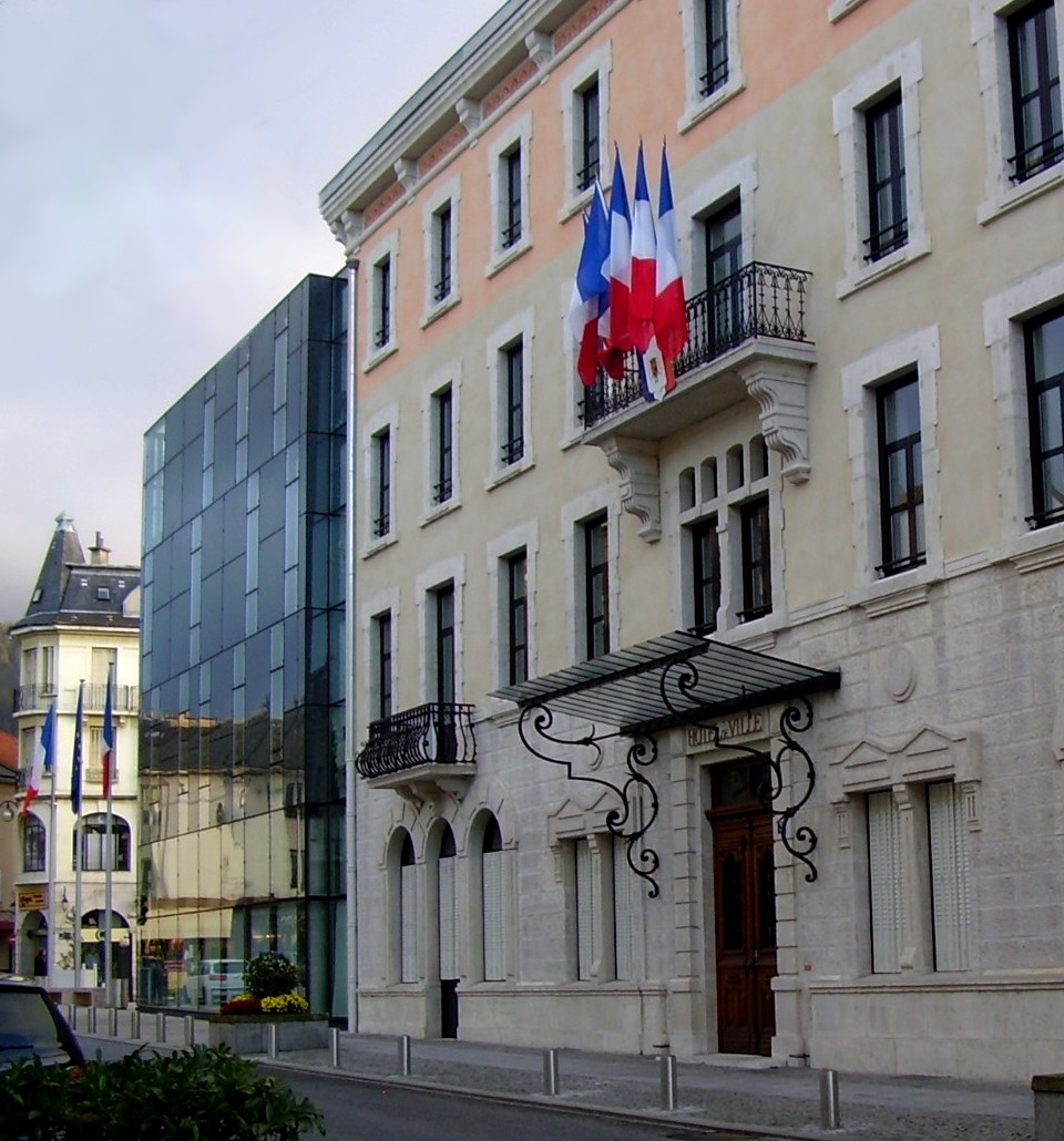 Hotel de ville d'Oyonnax, côté avenue J. Jaurès